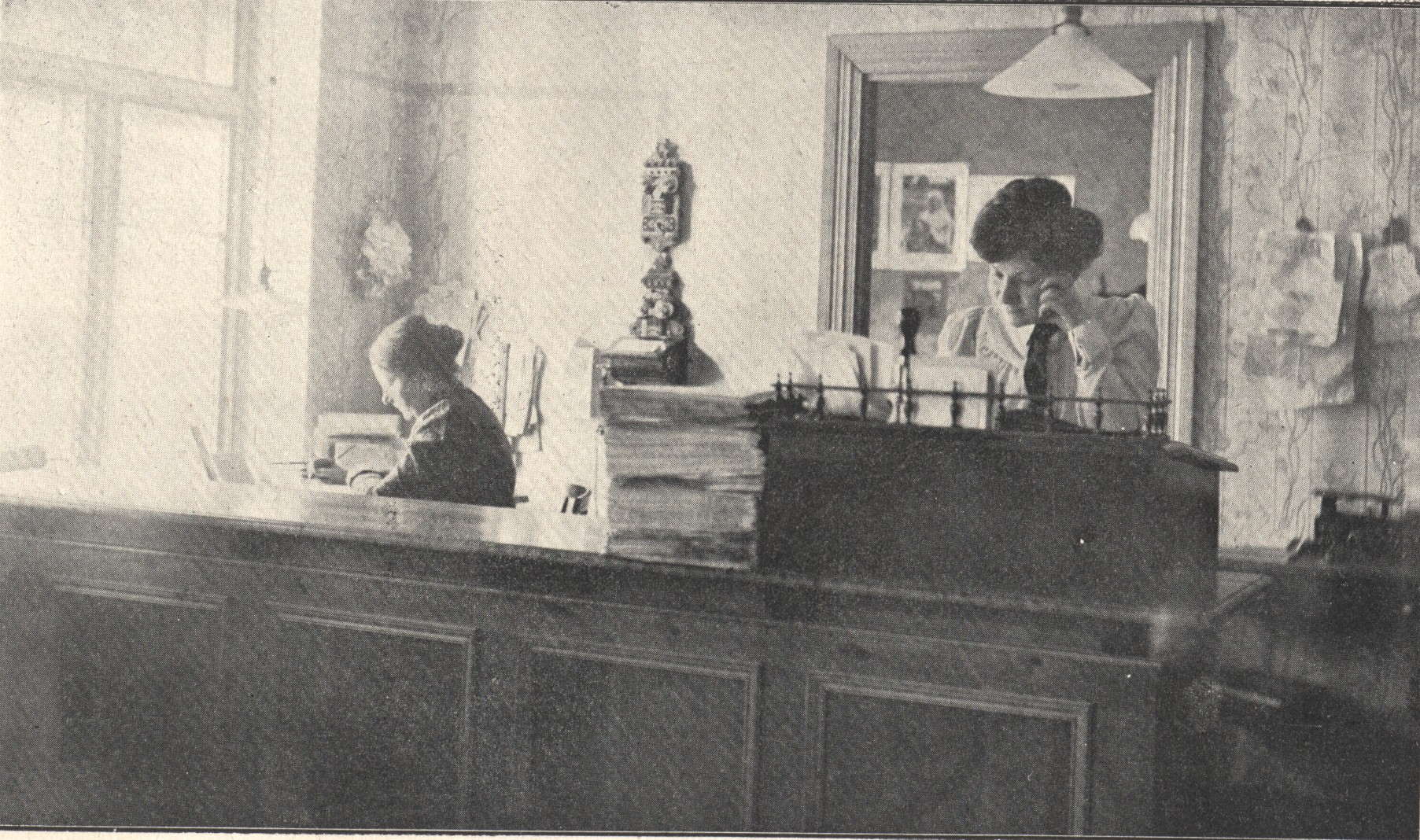 Aamulehden konttori v. 1906